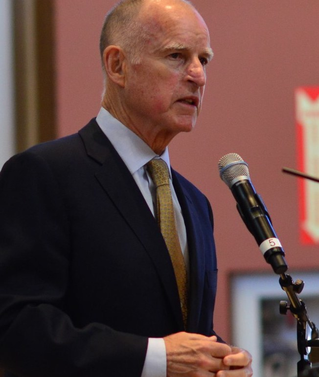 jerry brown